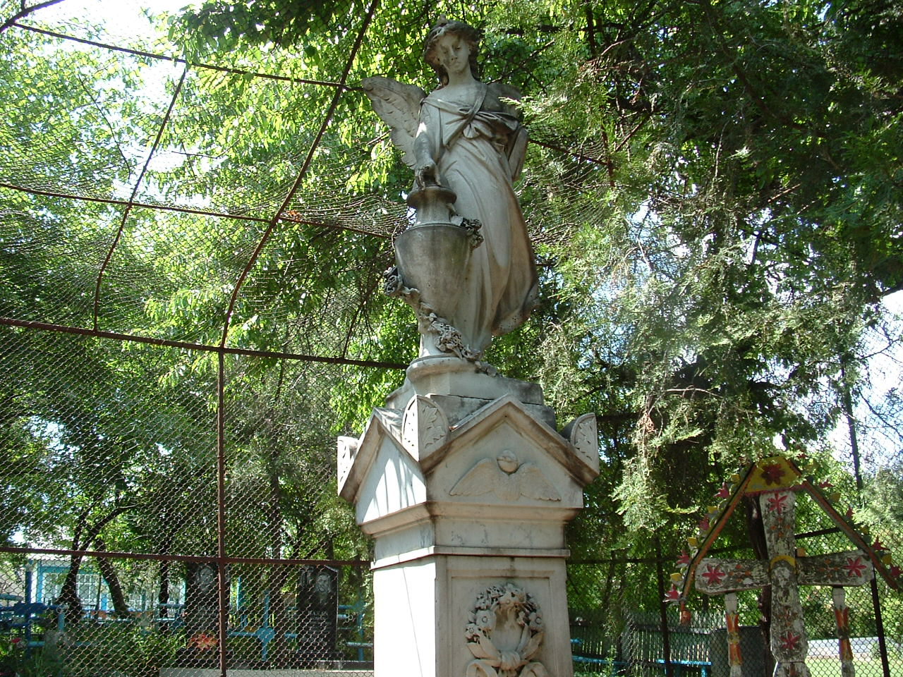 Acest monument de arta este instalat de catre George Gaspar Goilav pe mormintul sotiei sale (si al sau), ingradit de-o plasa sub forma de "kupola" si e aparat si ingrijit de biserica din satul Sarata Veche, Falesti. Este confectionat din mramora de un sculptor renumit, Italian- Beretta, in or. Odessa sursa-inscriptia de pe temelia monumentului.